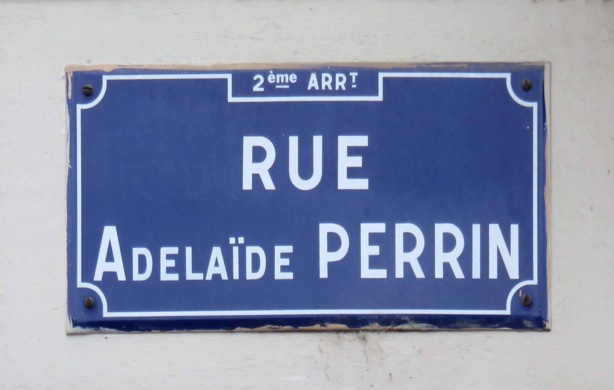 Plaque de la rue Adélaïde-Perrin, dans le 2e arrondissement de Lyon.